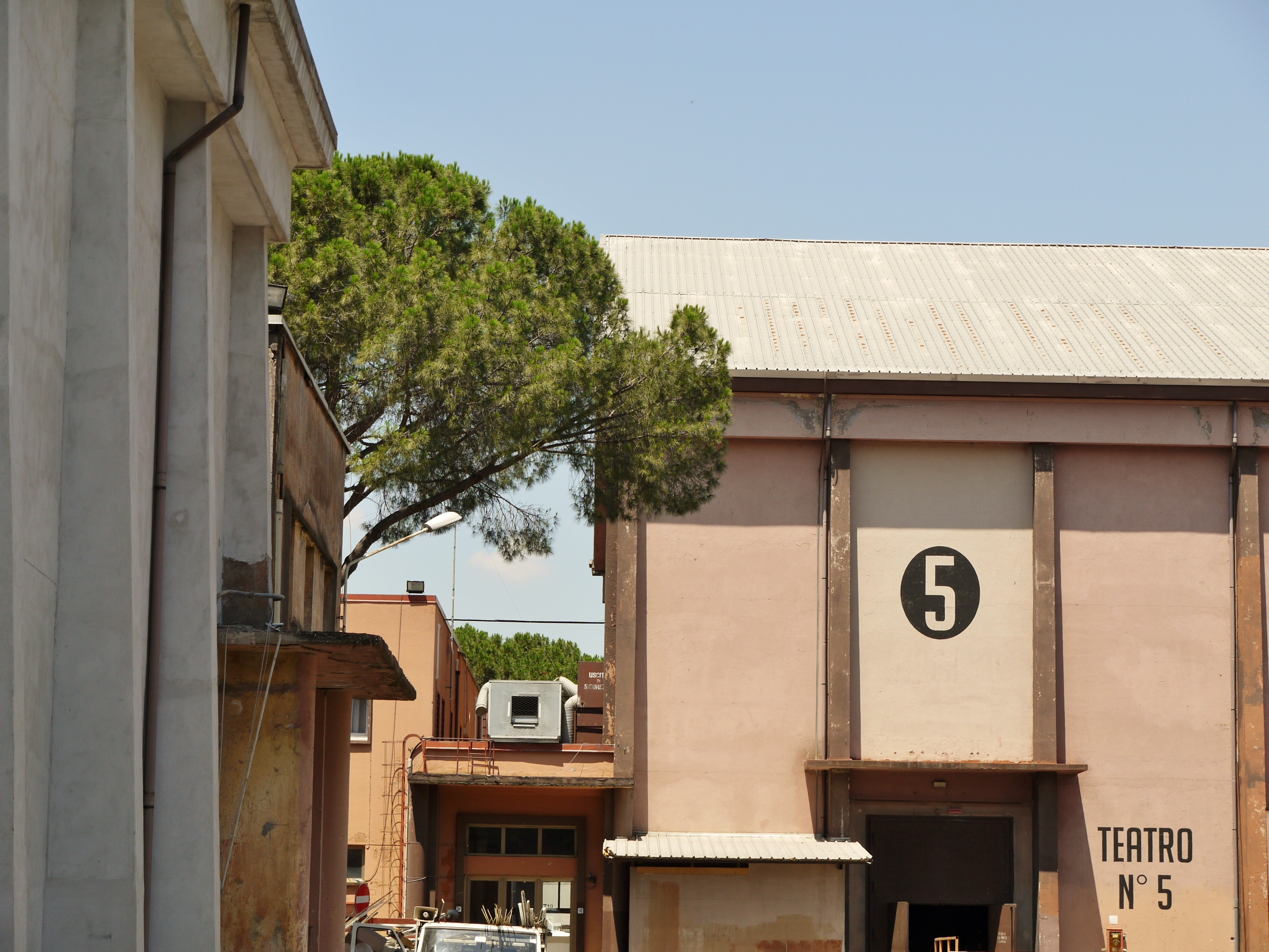 Studio n°5, principalement utilisé par Federico Fellini